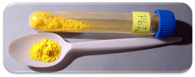 Jodid olovnatý - PbI2